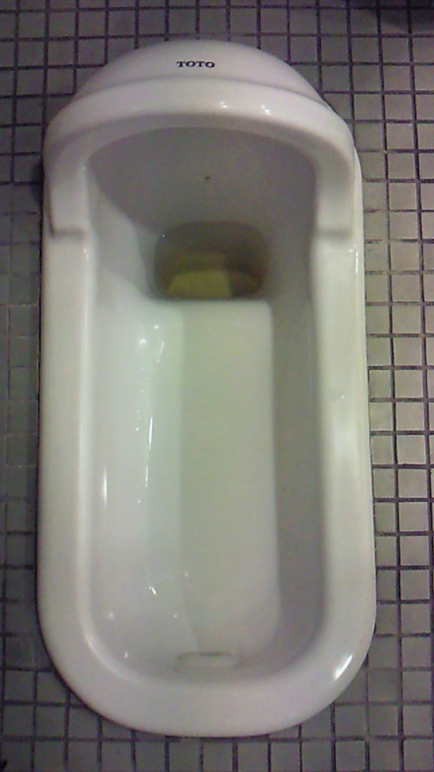 中水道便器